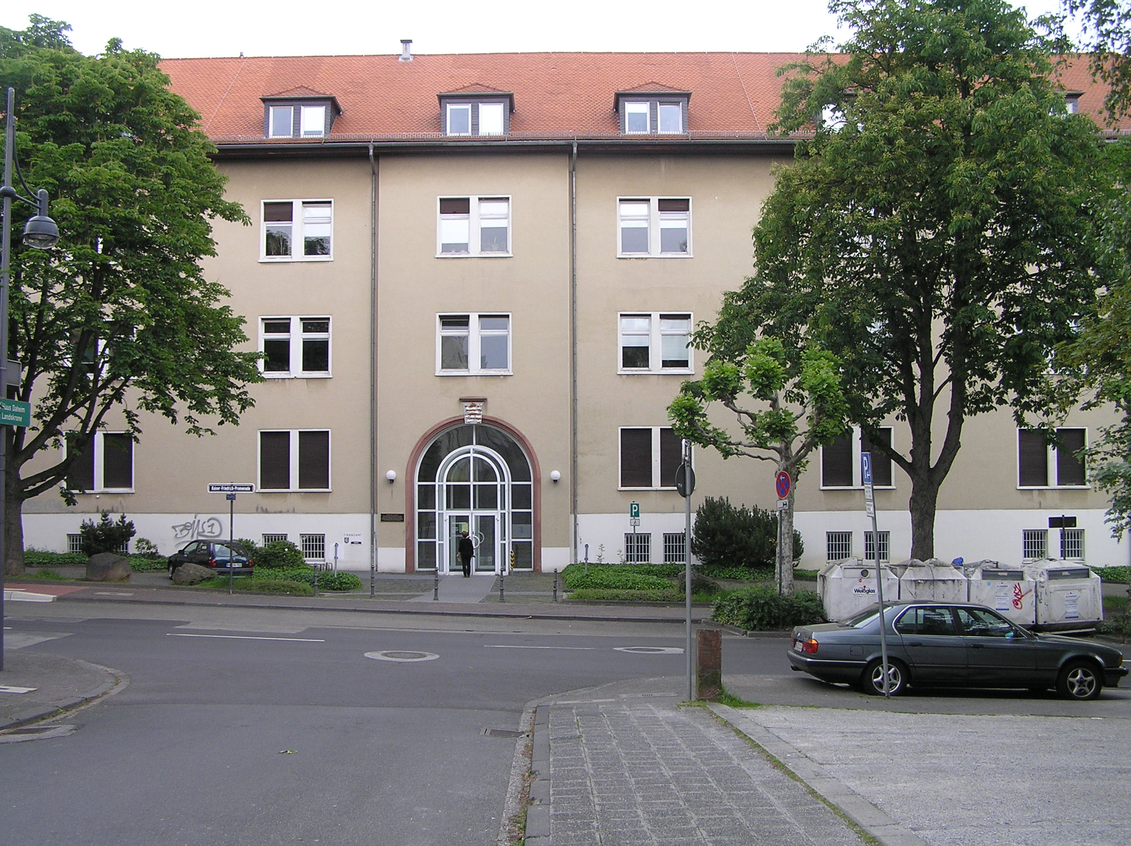 Finanzamt in Bad Homburg vor der Höhe, Deutschland. Das Gebäude wurde 1854 als Kaserne für das Militär der Landgrafenschaft Hessen-Homburg errichtet. 1871 bis 1918 war es Garnison des Füsilier-Regimentes von Gersdorff (Kurhessisches) Nr. 80. In der Weimarer Republik und in der Zeit des Nationalsozialismus diente es als Standortverwaltung. Nach dem Wiederaufbau nach dem zweiten Weltkrieg wurde es ab 1951 als Finanzamt genutzt.